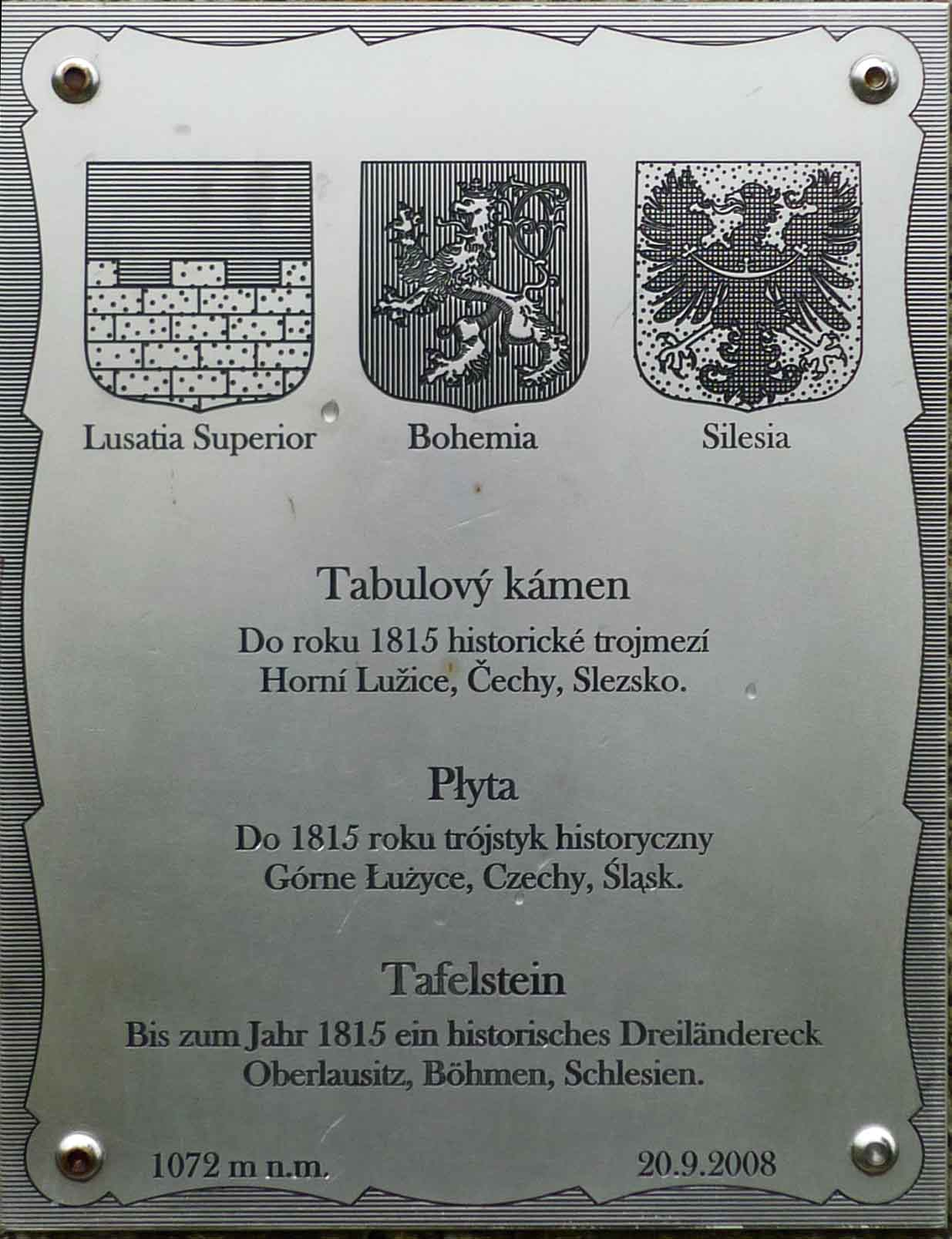 Tablica pamiątkowa na dawnym kamieniu granicznym (zwanym "Kamieniem Stołowym") po polskiej stronie Smreka